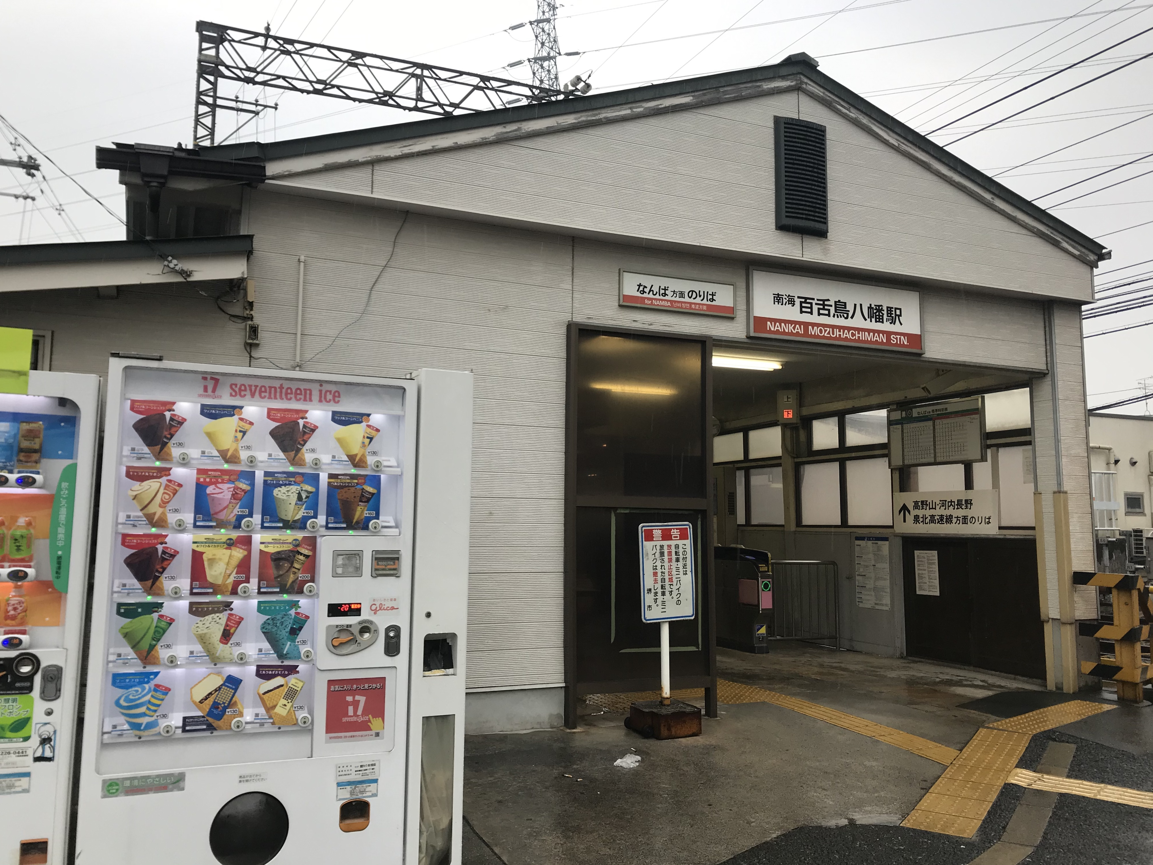 百舌鳥八幡駅のなんば方面駅舎